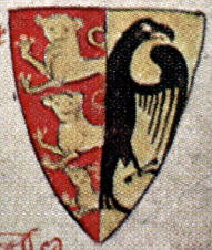 Znak Matthewa Parise symbolizující spojenectví Jana Bezzemka a Oty IV. Brunšvického. Arms of Otto IV (1175 – 19 May 1218) one of two rival kings of Germany from 1198 on, sole king from 1208 on, and Holy Roman Emperor from 1209 until he was forced to abdicate in 1215. He was the third son of Henry the Lion, Duke of Bavaria and Duke of Saxony, by his wife and Matilda of England, the eldest daughter of King Henry II of England and Eleanor of Aquitaine. Arms: Braunschweig dimidiating arms of the Holy Roman Emperor.